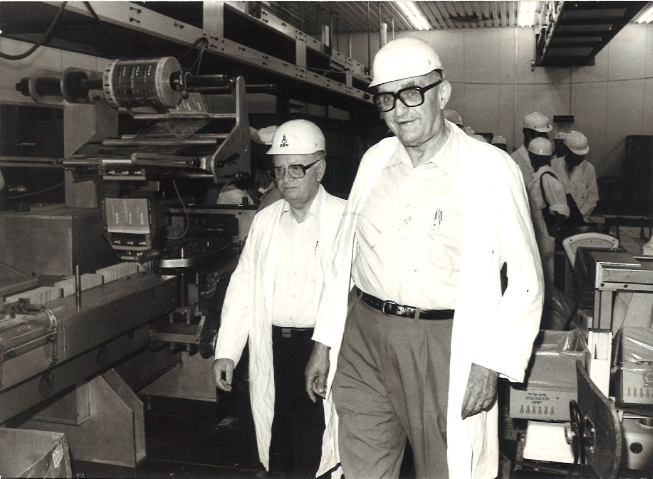 אויגן פרופר עם שר האוצר שמחה ארליך ביקור במפעל